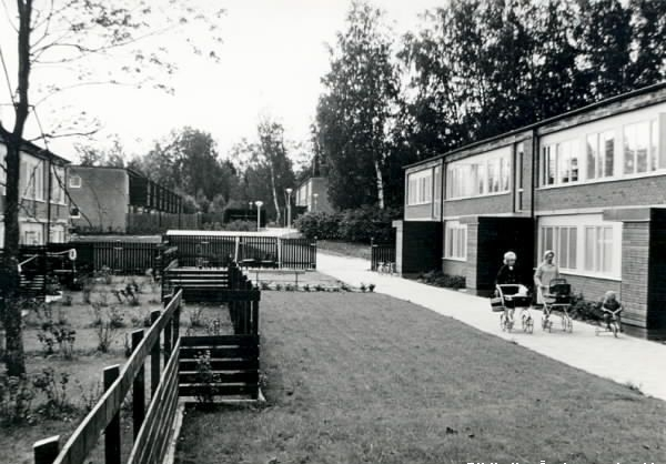 Vivalla bostadsområde i Örebro